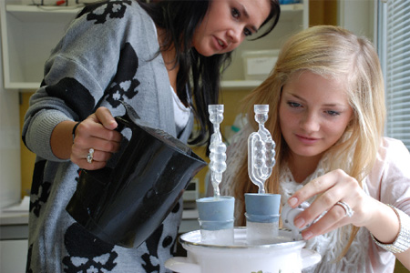 Naturvetenskap inom Naturbruksprogrammet.